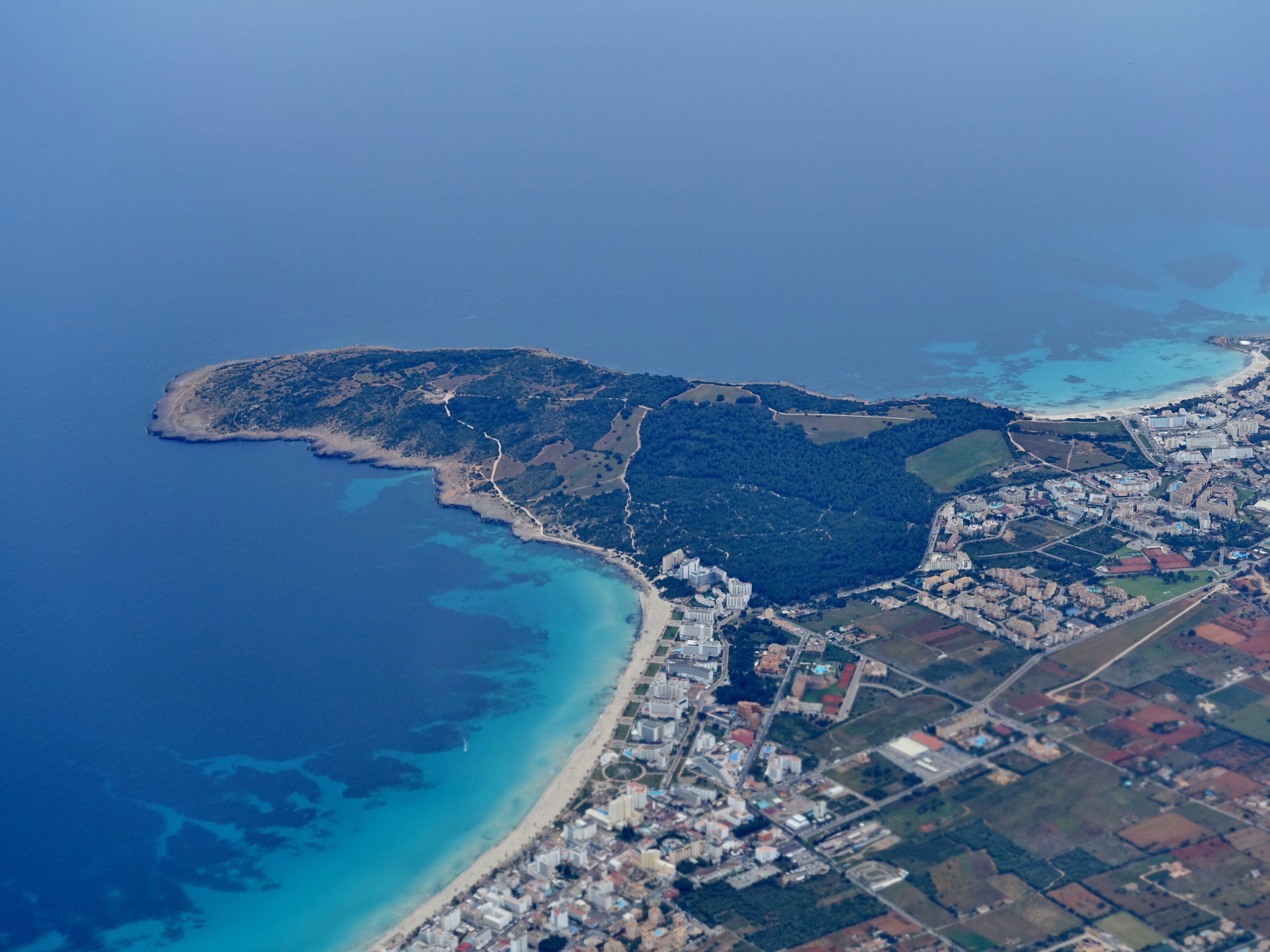 Halbinsel Punta de n’Amer, Gemeinde Sant Llorenç des Cardassar, Mallorca, Spanien